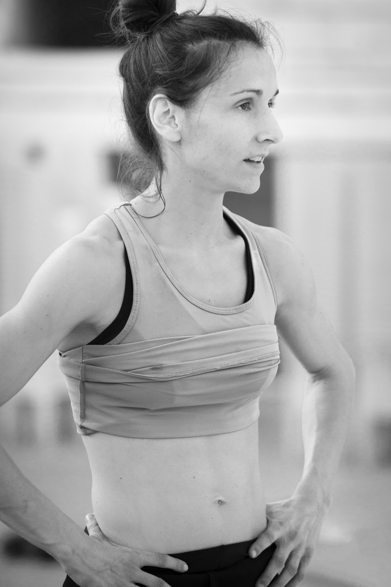 La exgimnasta rítmica Violeta Giménez en julio de 2013 durante los ensayos de un espectáculo de Dinamic en Ondara (Alicante).